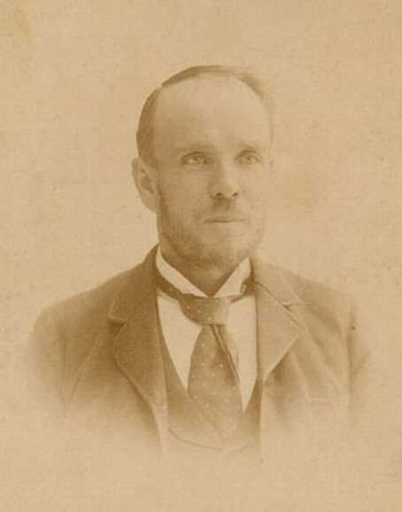 Honoré Petit (28 janvier 1847 - 1er décembre 1922) est un homme politique québécois. Député conservateur dans Chicoutimi-Saguenay en 1892 et en 1897, élu sous la bannière libérale en 1900, 1904 et 1908, et à Chicoutimi en 1912 et en 1916.